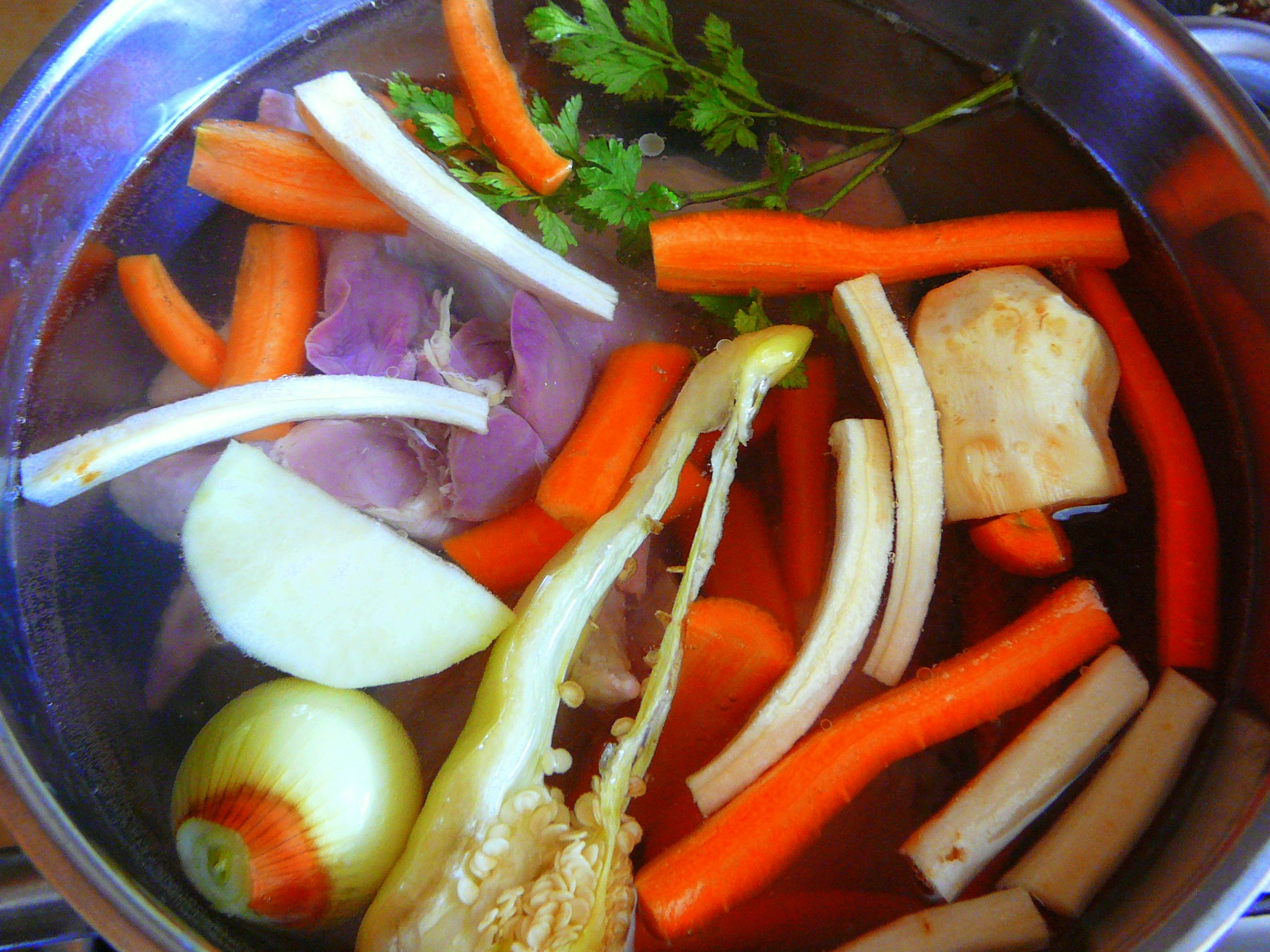 Húsleves